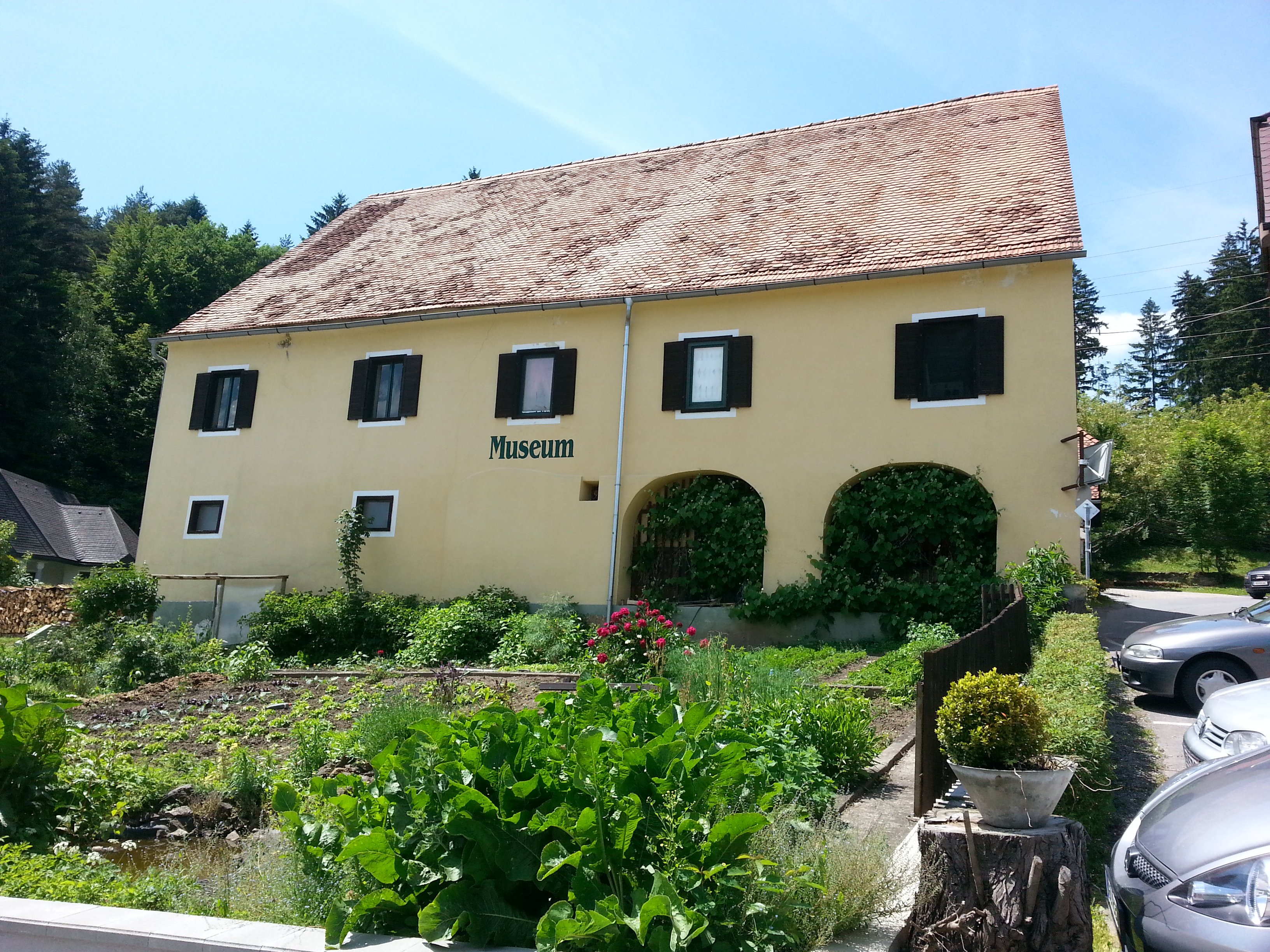 Das Antiquitäten- und Krampusmuseum in der Gemeinde Stallhofen, Steiermark, Österreich